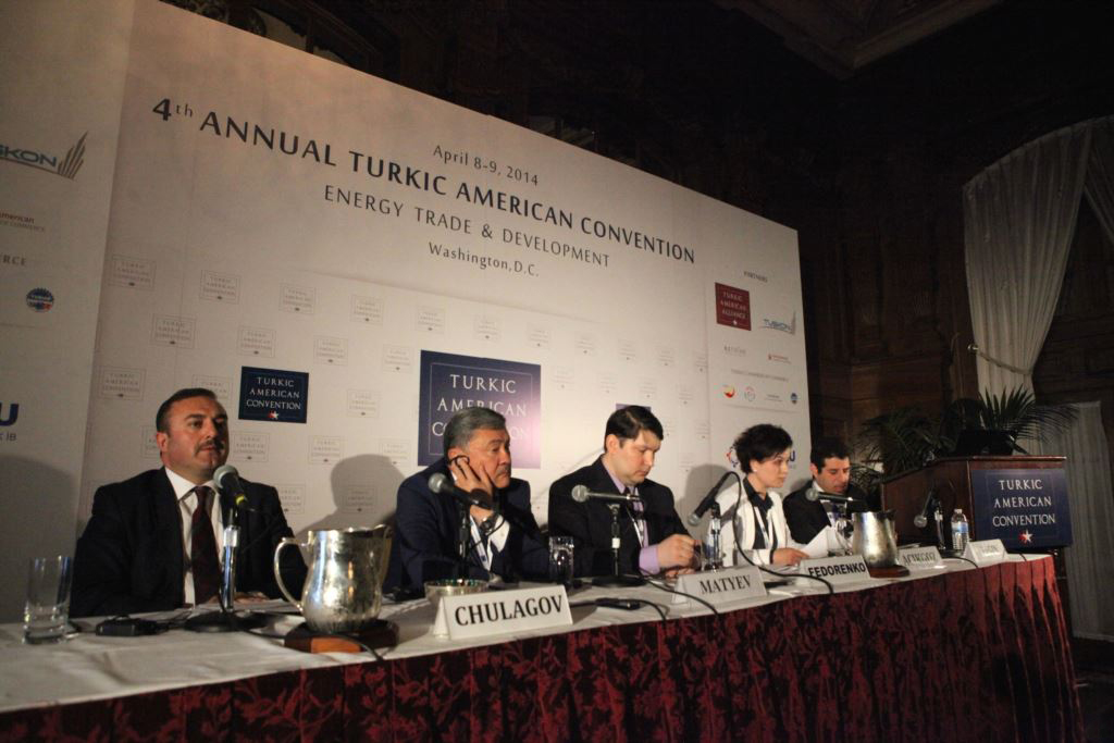 Dördüncüsü düzenlenen Türki Amerikan Birliği Kurultayı'ndan bir kare.